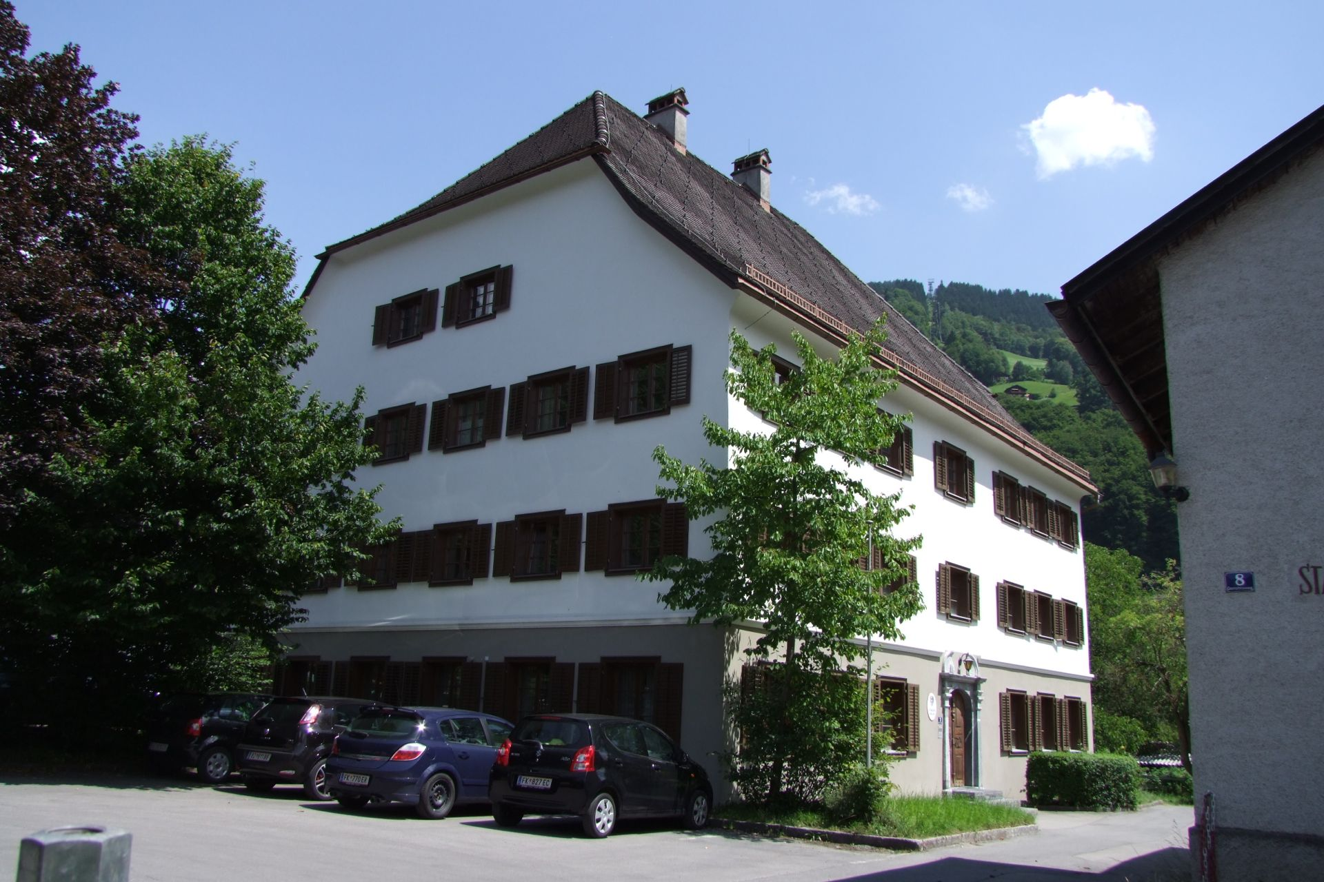 Bezirksgericht Montafon samt Waschhaus